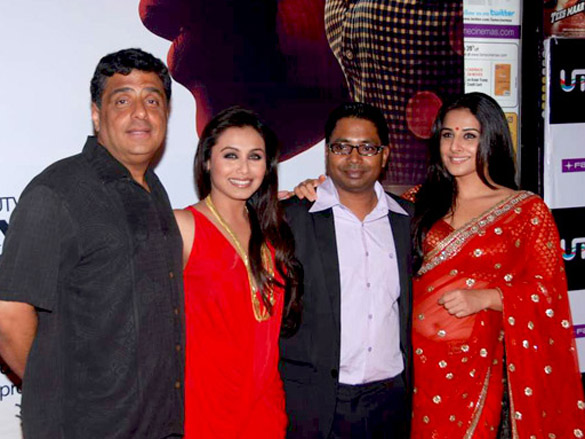 Penayangan perdana dari No One Killed Jessica